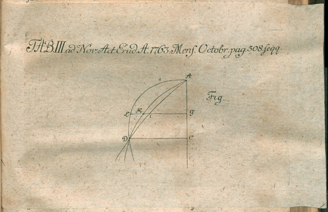 Illustration